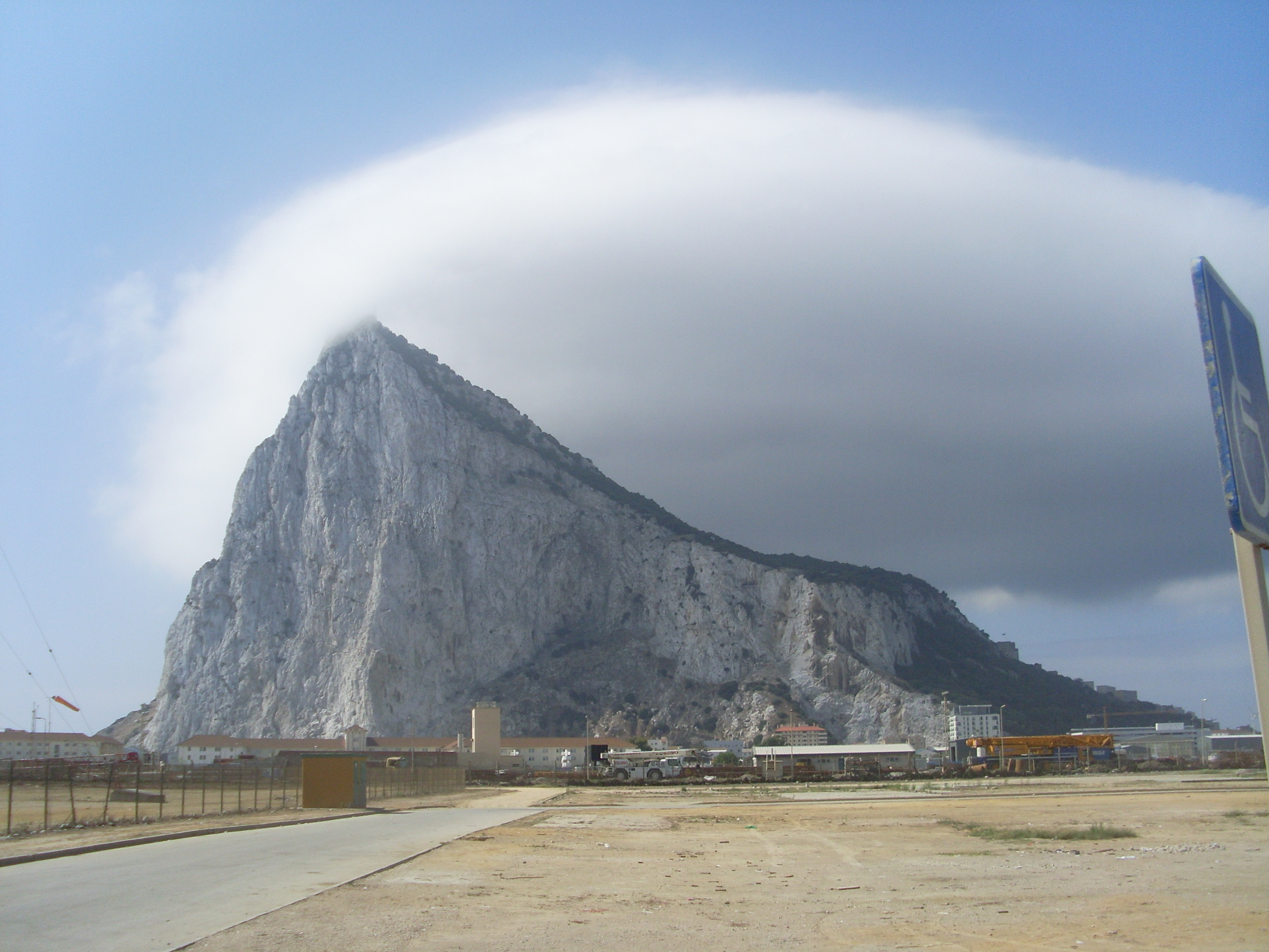 Efecto 'foam', Gibraltar, verano de 2010